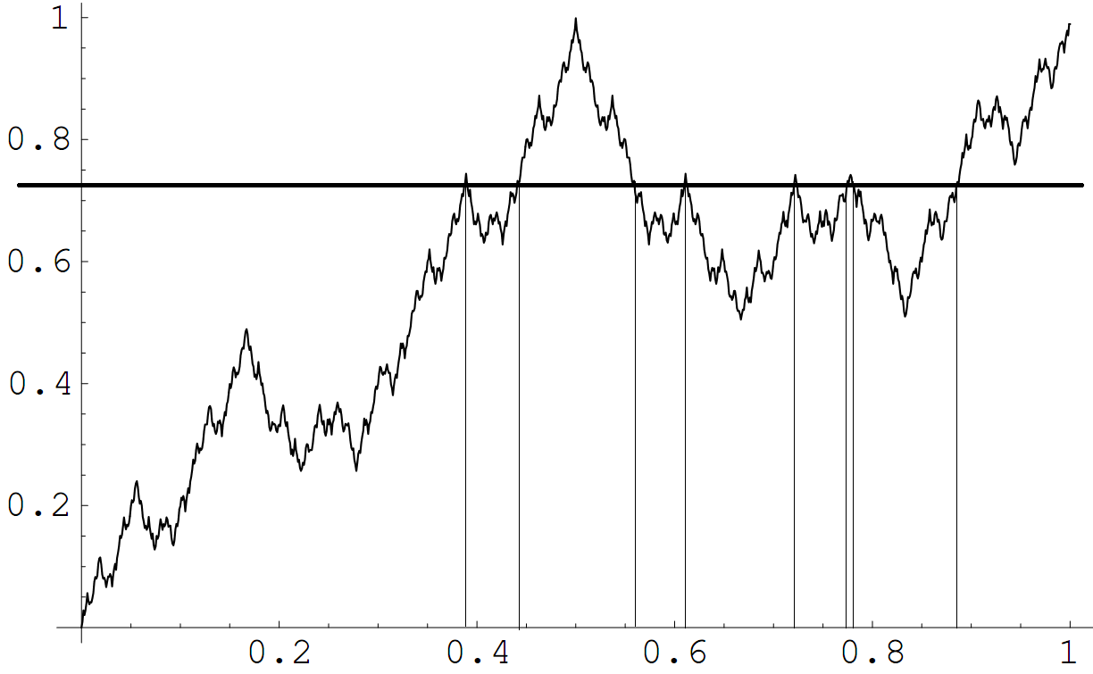 фрактальна функція - трибін функція